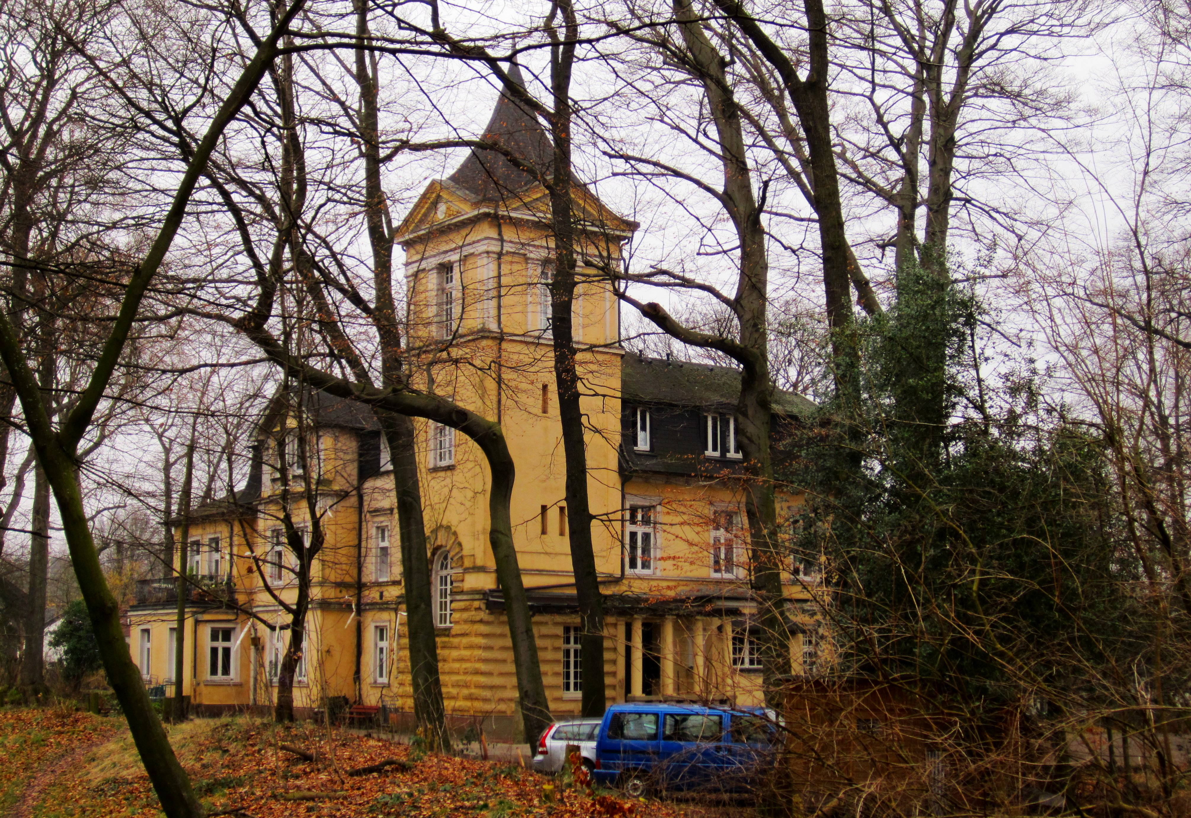 Villa Baare in Bochum-Höntrop, Ansicht von Süden